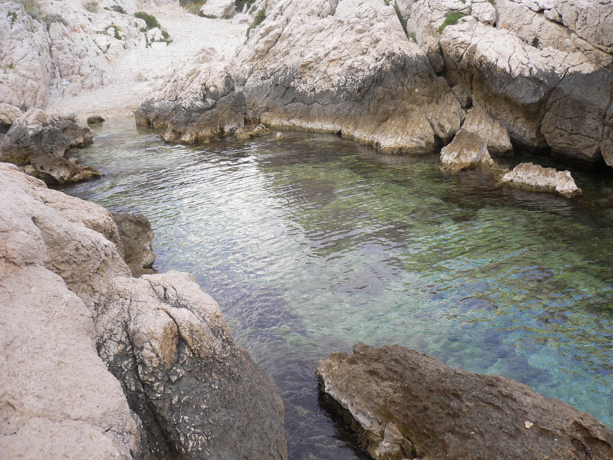 Calanque de la Mounine (Bouches-du-Rhône, France)